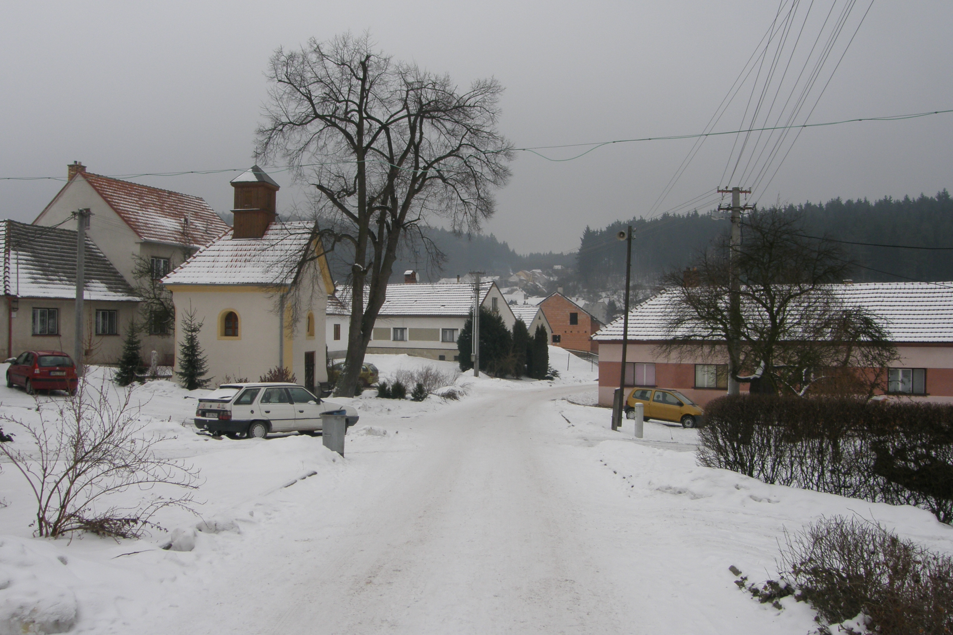 Kuničky, nalevo kaple sv. Cyrila a Metoděje